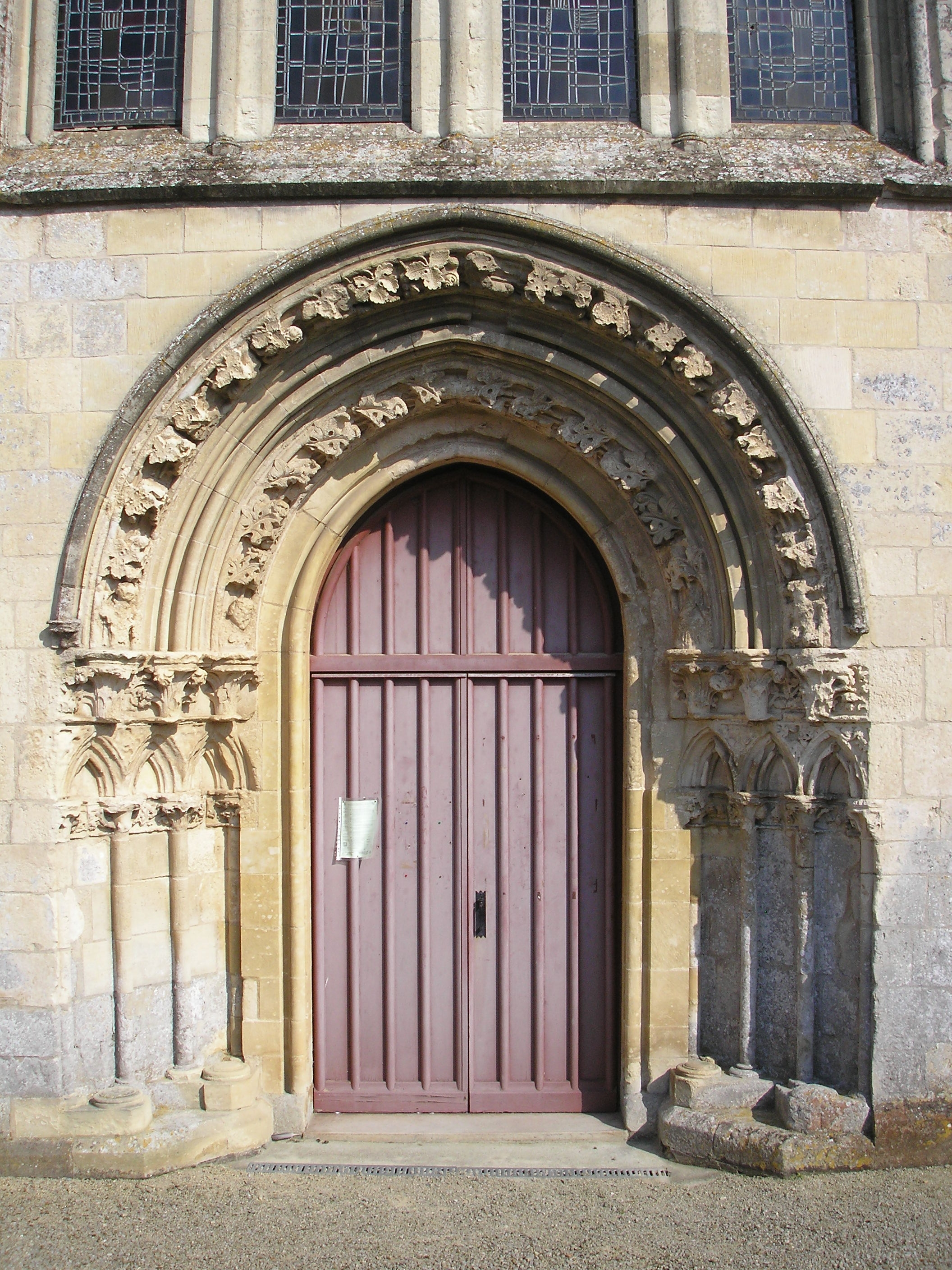 Rouvres (Normandie, France). Le portail de l'église Notre-Dame.